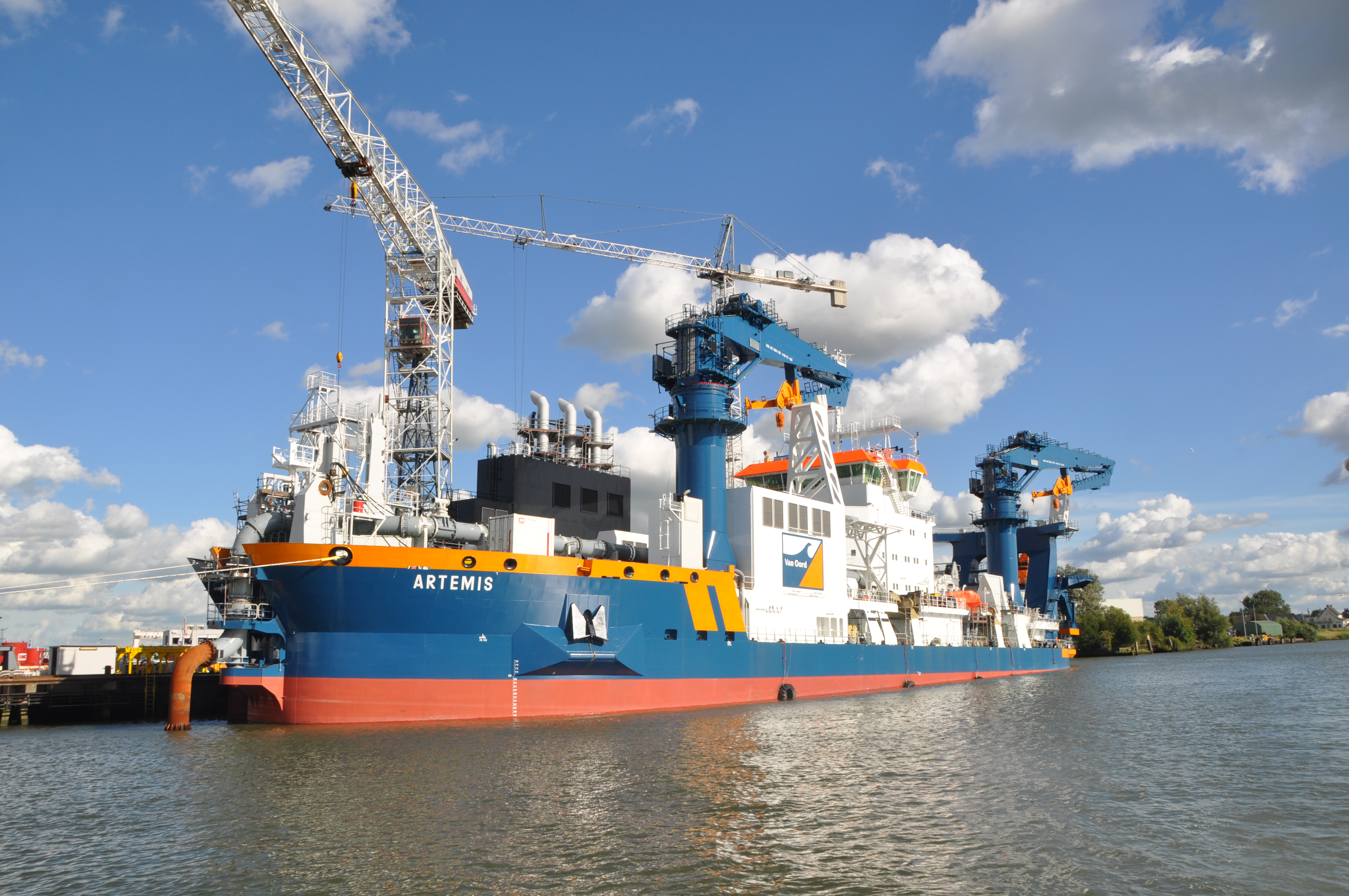 De ARTEMIS in aanbouw voor de wal bij IHC op de Noord